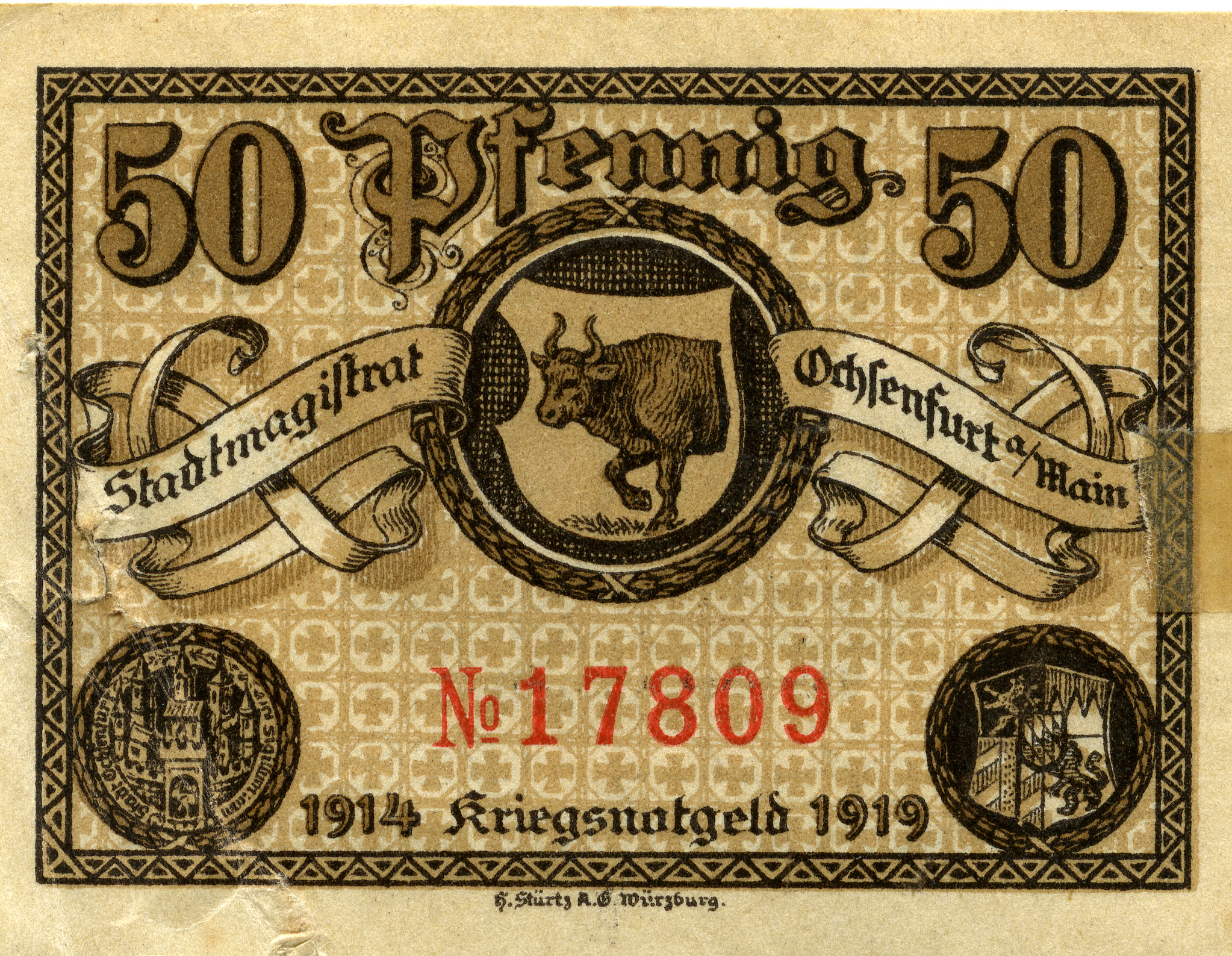 Nødpenge fra Første Verdenskrig. Fået af driftsbestyrer K.S. Knudsen, driftsbestyrer ved Vandelbanen. Født sønderjyde. Ansat ved Vandelbanen 1916.